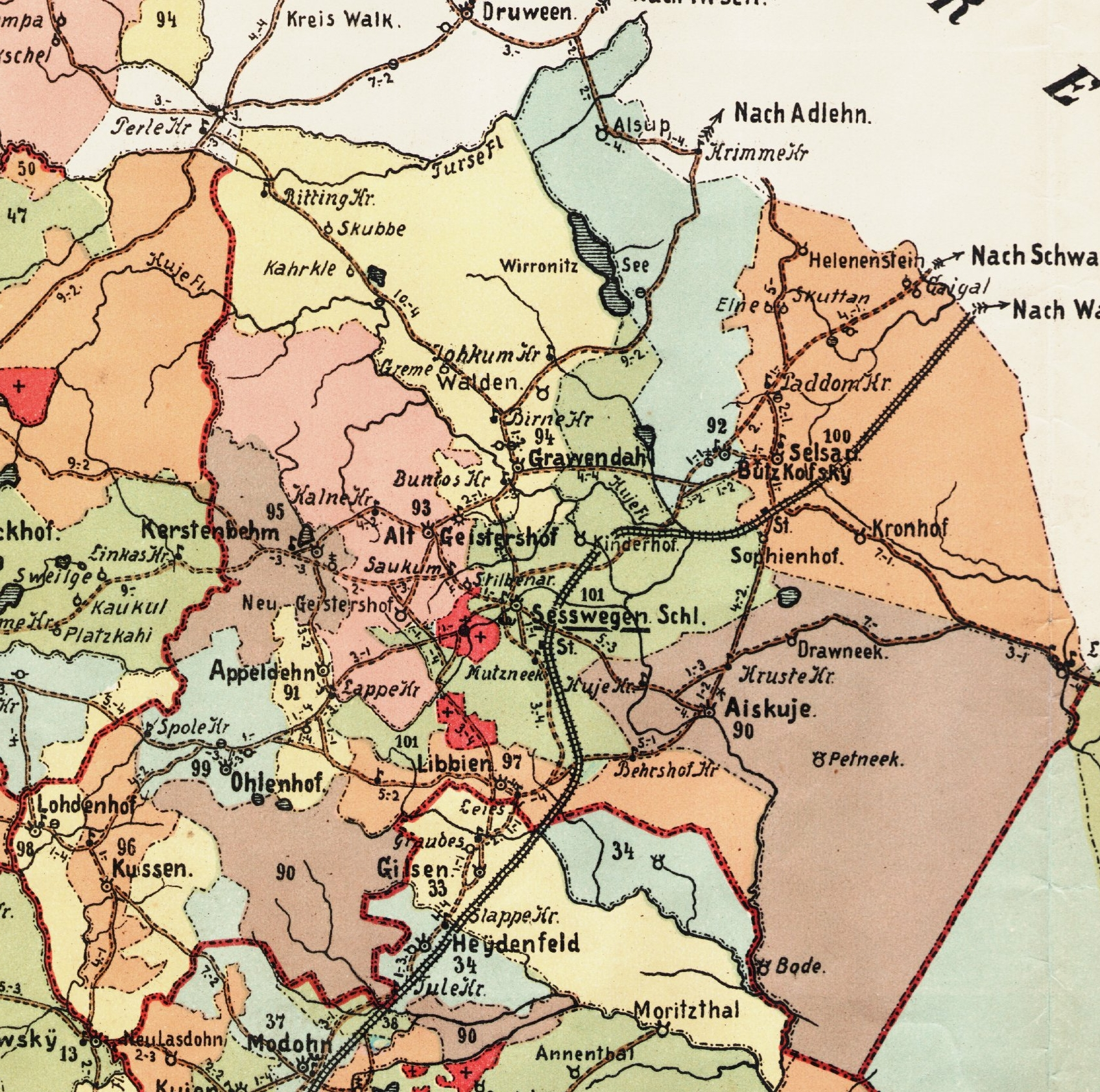 Võnnu kreisi Cesvaine kihelkonna mõisad 1903. aasta kaardil.